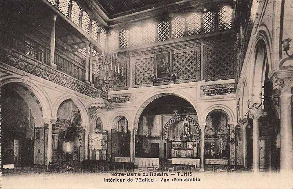 Bab Djedid, Tunis